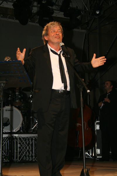 Paolo Rossi